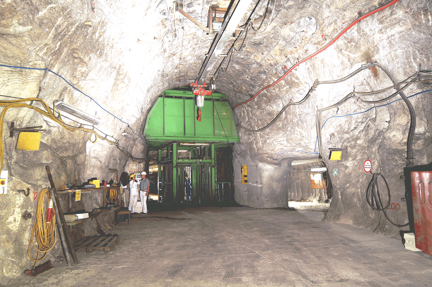 Ansicht des Steinsalz-Füllortes des Schachtes Halle